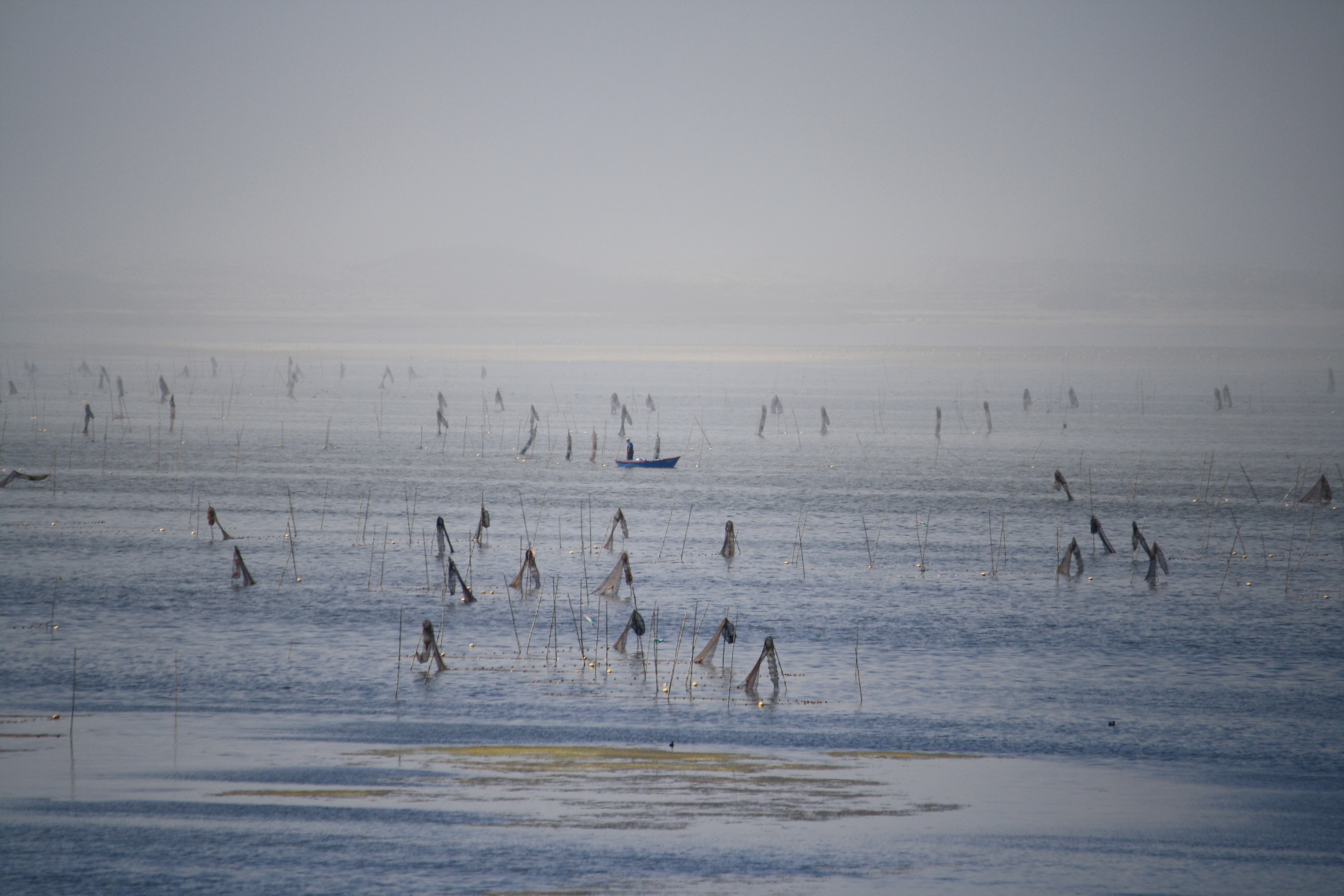 Visser in roeiboot